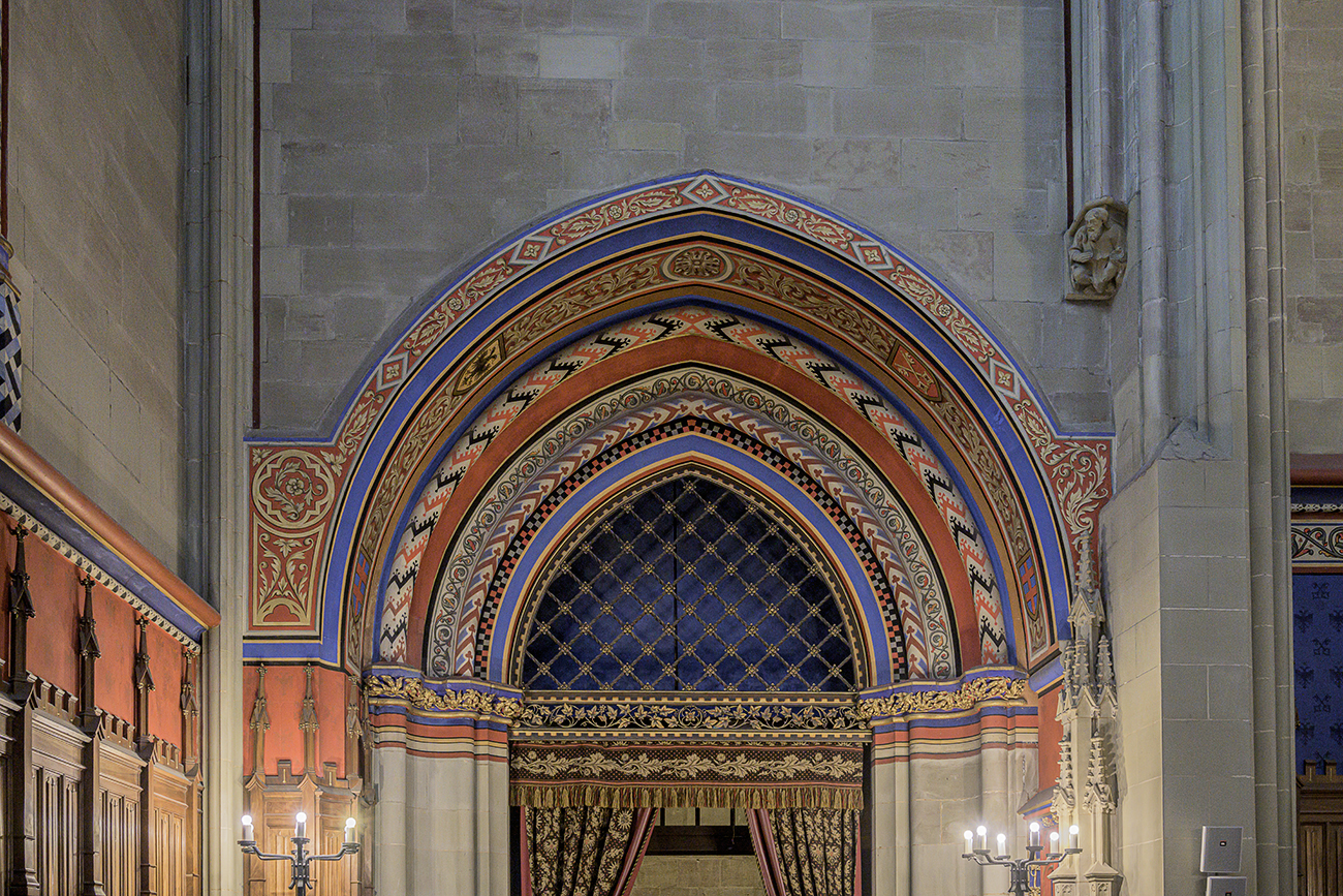 Makkabäer-Kapelle der Kathedrale St. Peter in Genf, Schweiz (Ausgang)